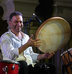 حسین رضایی‌نیا کنسرت همایون شجریان ۱۷ شهريور ۱۳۹۳